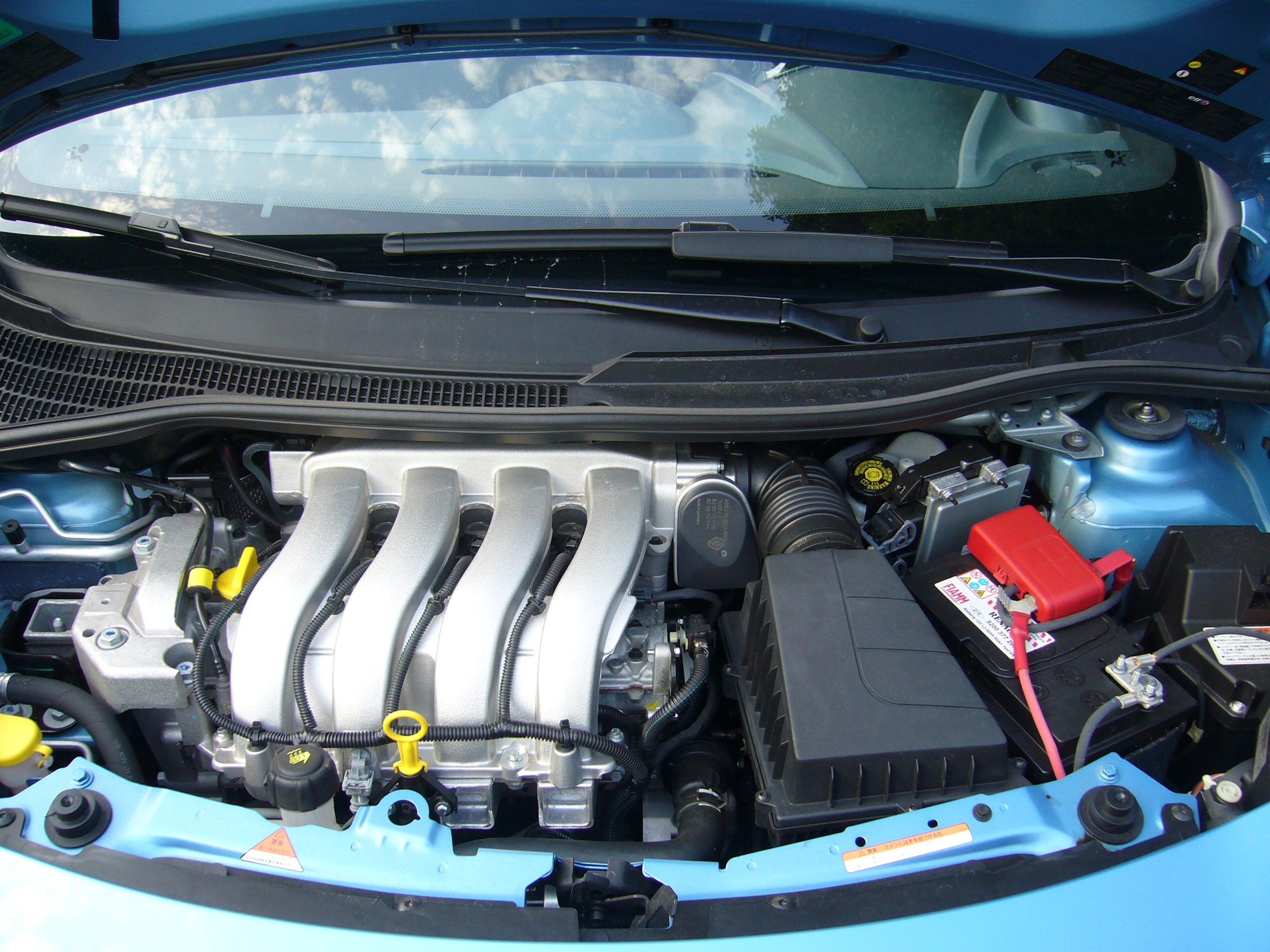 ルノー・ウインド